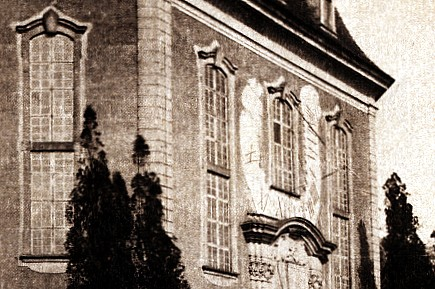 Ausschnitt aus einer Fotografie der Loschwitzer Kirche aus dem Jahr 1895, die die damalige Gestaltung der Sonnenuhr über dem Hauptportal zeigt.